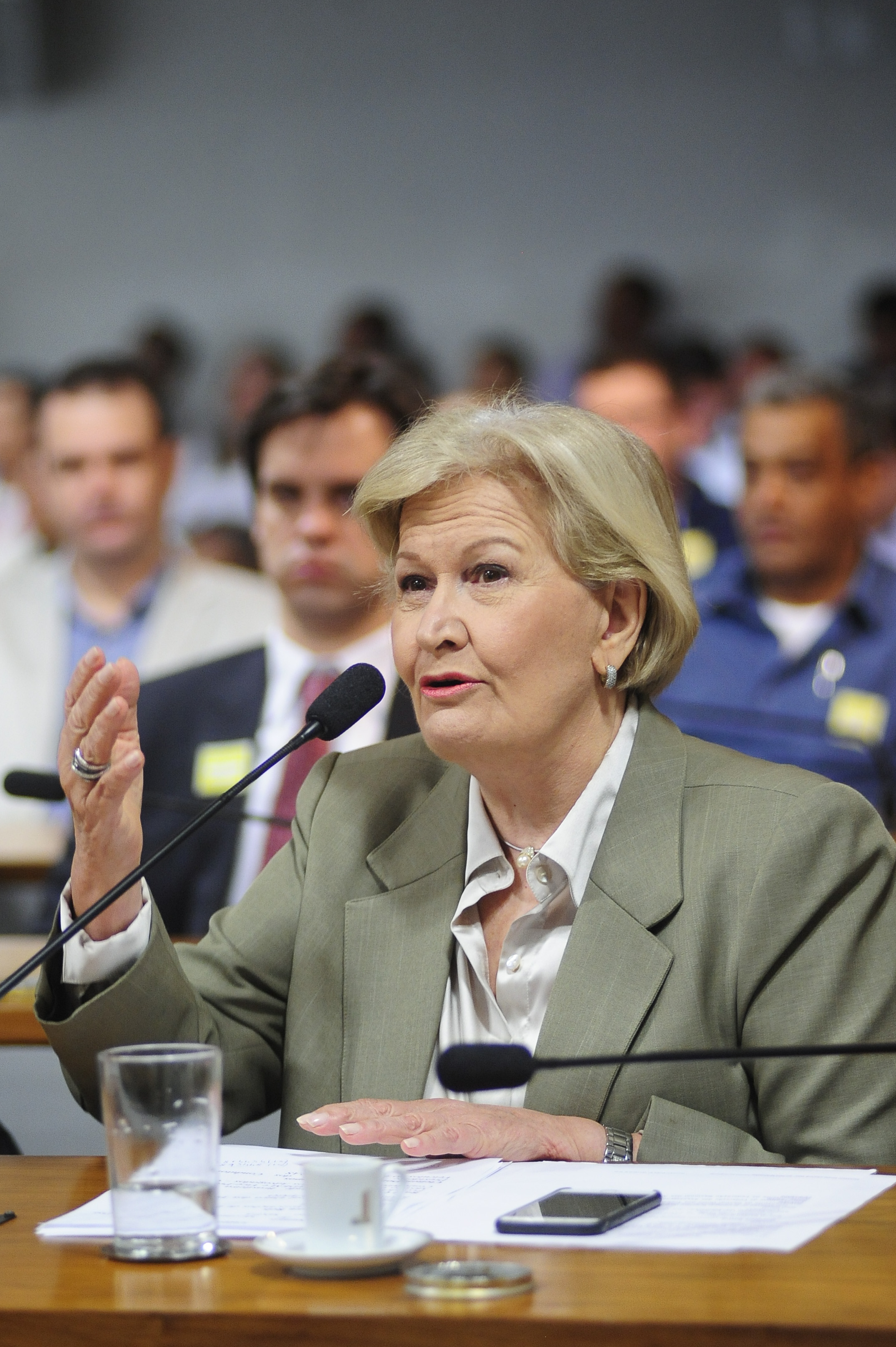 Comissão de Direitos Humanos e Legislação Participativa (CDH) realiza audiência pública interativa para debater sobre: "Os Objetivos do Movimento Nacional Pro Associativismo." À bancada, senadora Ana Amélia (PP-RS). Foto: Pedro França/Agência Senado